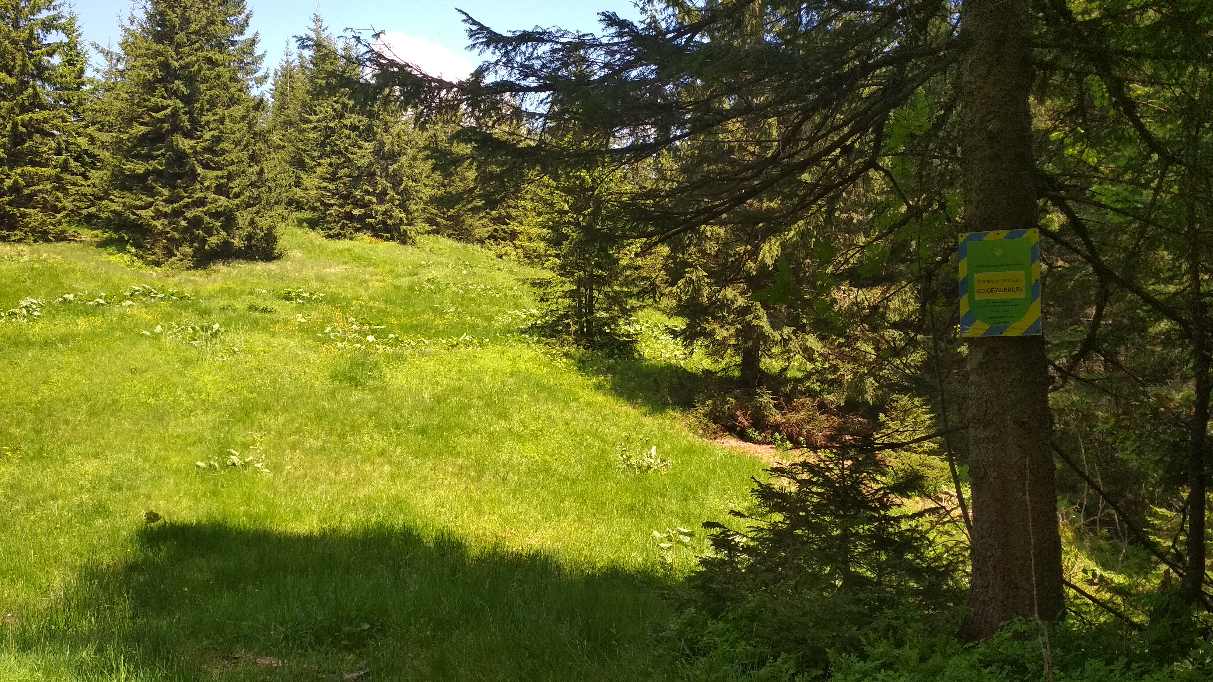 Встановлено з боку пол. Слобушниця